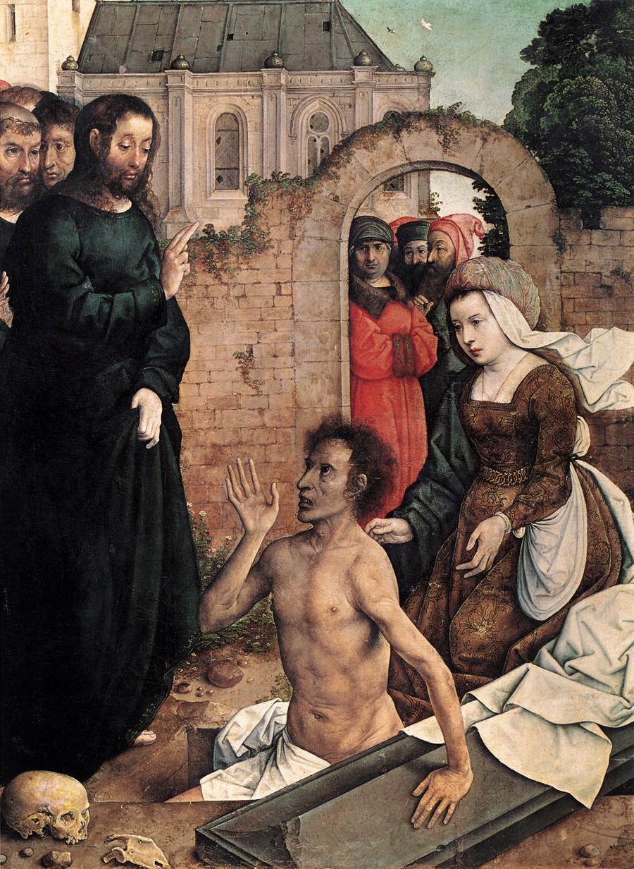 La obra representa a Jesucristo resucitando a Lázaro de Betania de entre los muertos.